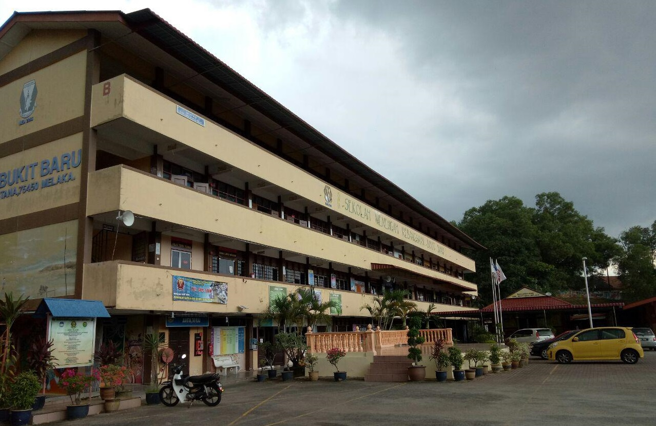 Bangunan Sekolah SMKBB terkini